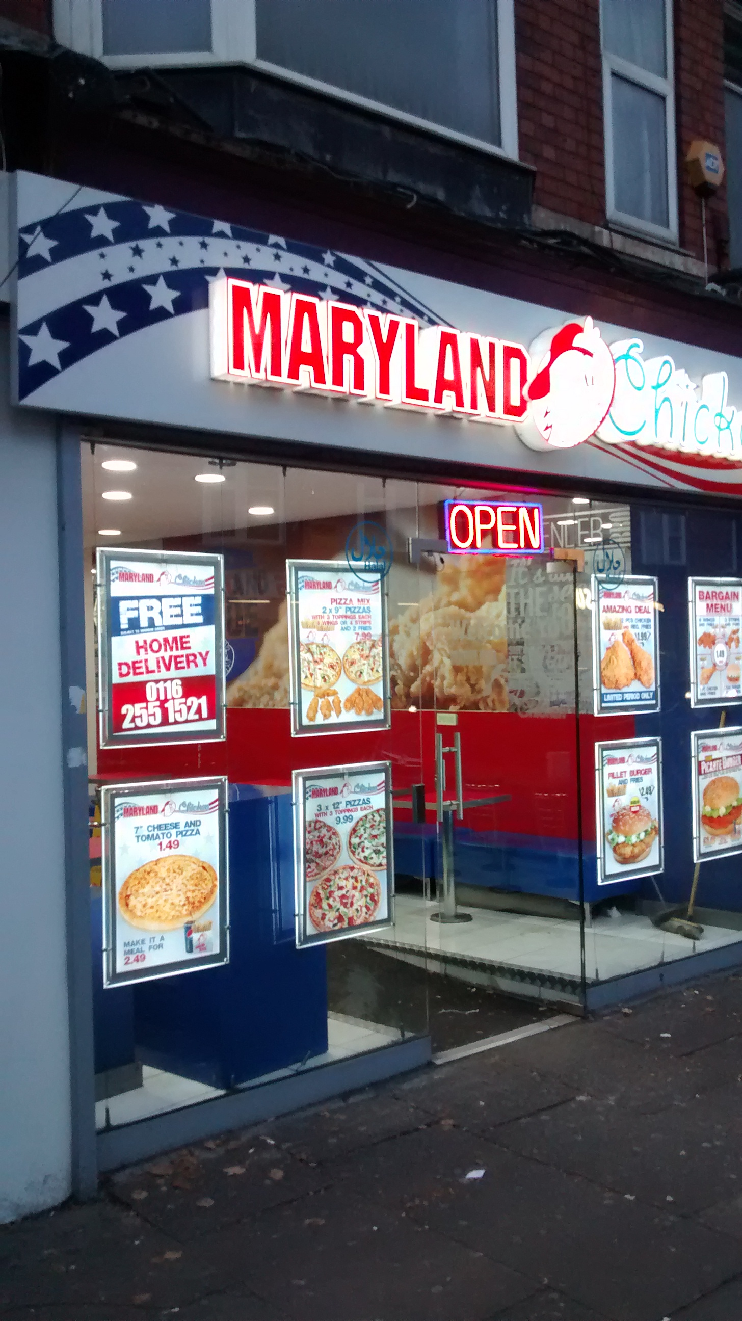 Maryland - Leicester Narborough Road